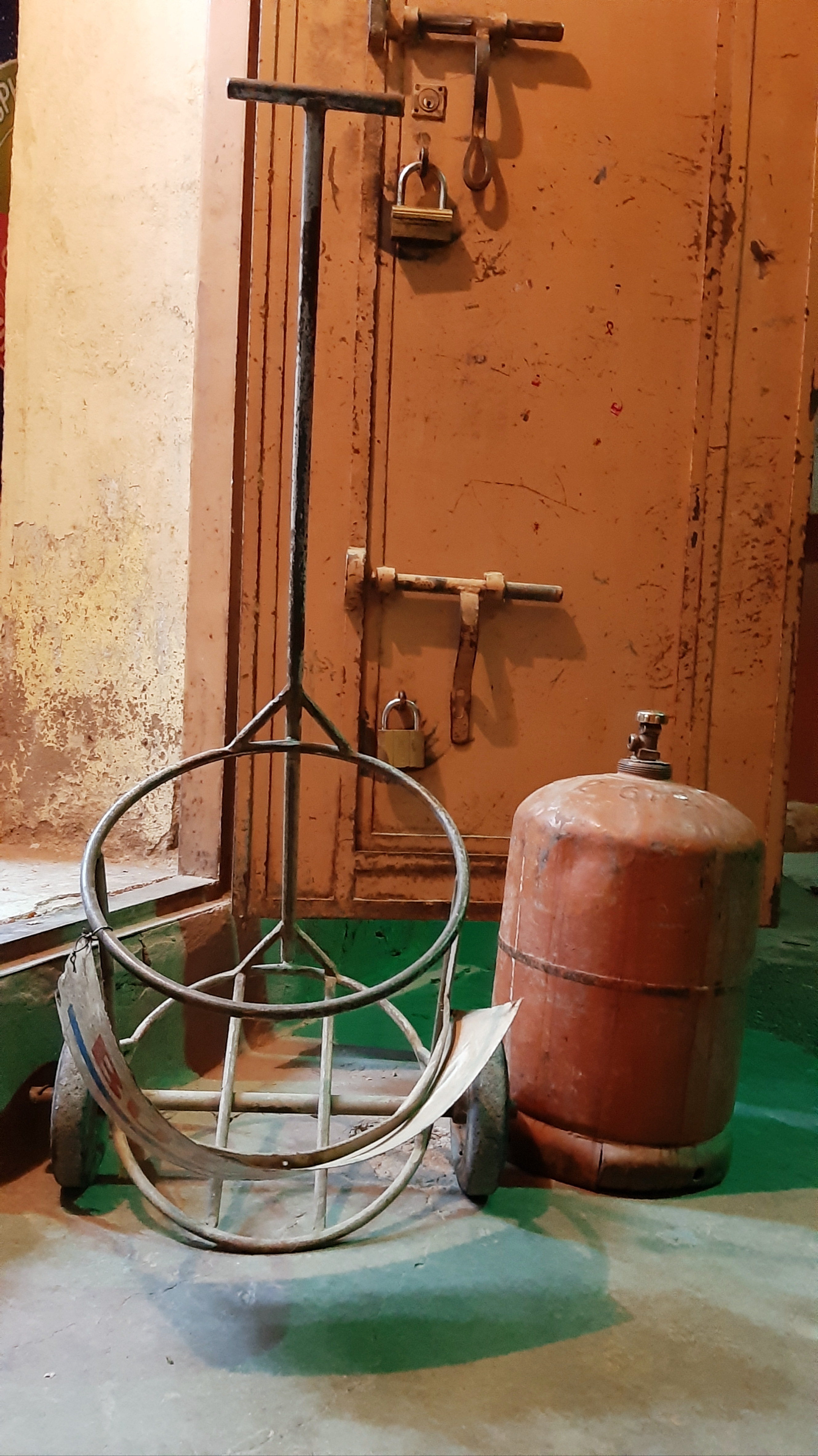 Porte-bouteille de gaz This is an image with the theme "Africa on the Move or Transport" from: Morocco